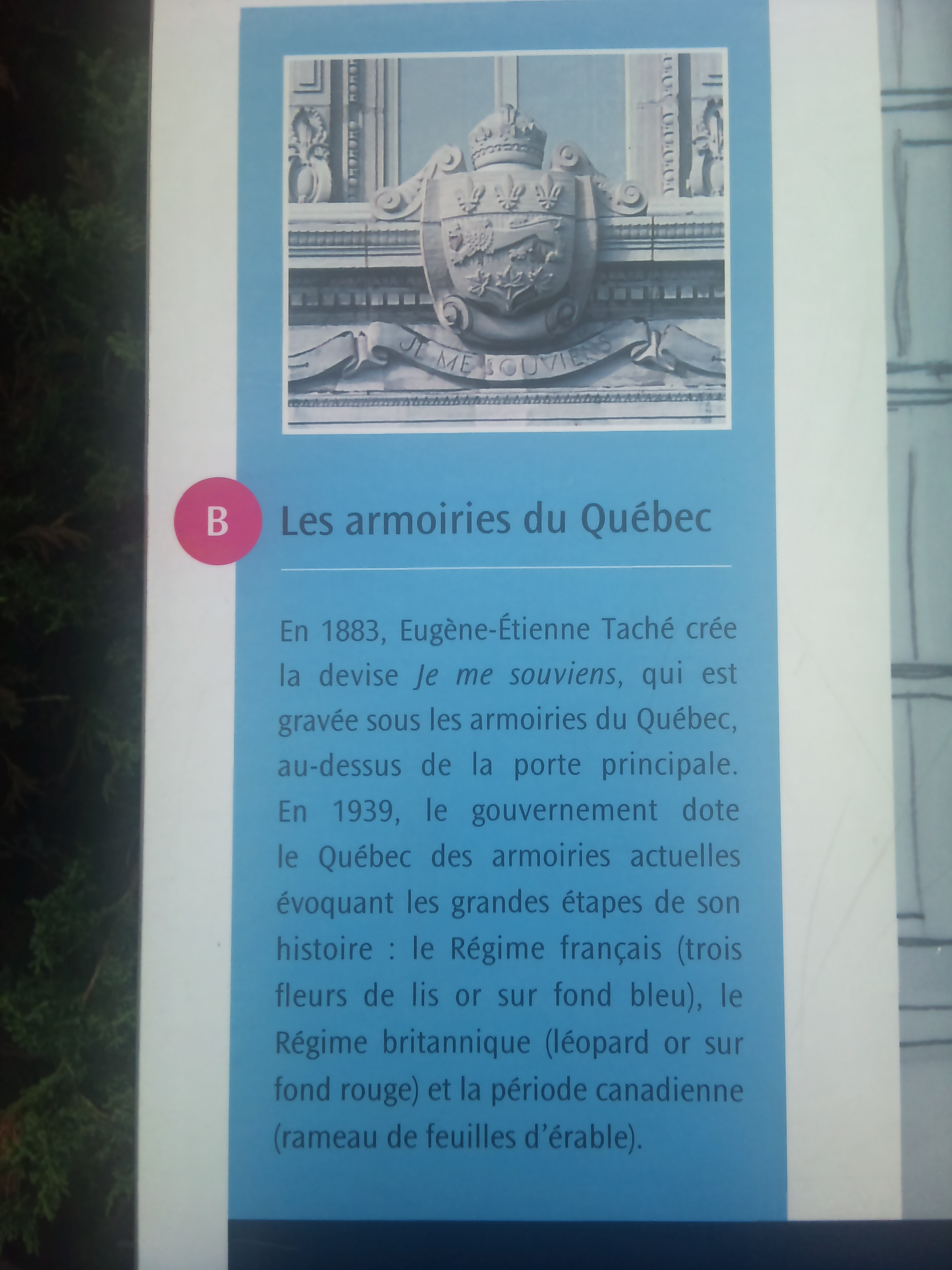 [魁北克的盾徽] 1883年，Eugène-Étienne Taché所立的格言 '我仍記得'，刻印在大門上方的魁北克盾徽上。今日的魁北克盾徽，乃是1939年省政府修改以闡述其歷史的重要階段：法國統治期 (三朵鳶尾花或藍底表徵)，英國統治期 (獅子或紅底表徵)以及加拿大自治時期 (楓葉嫩葉表徵)。